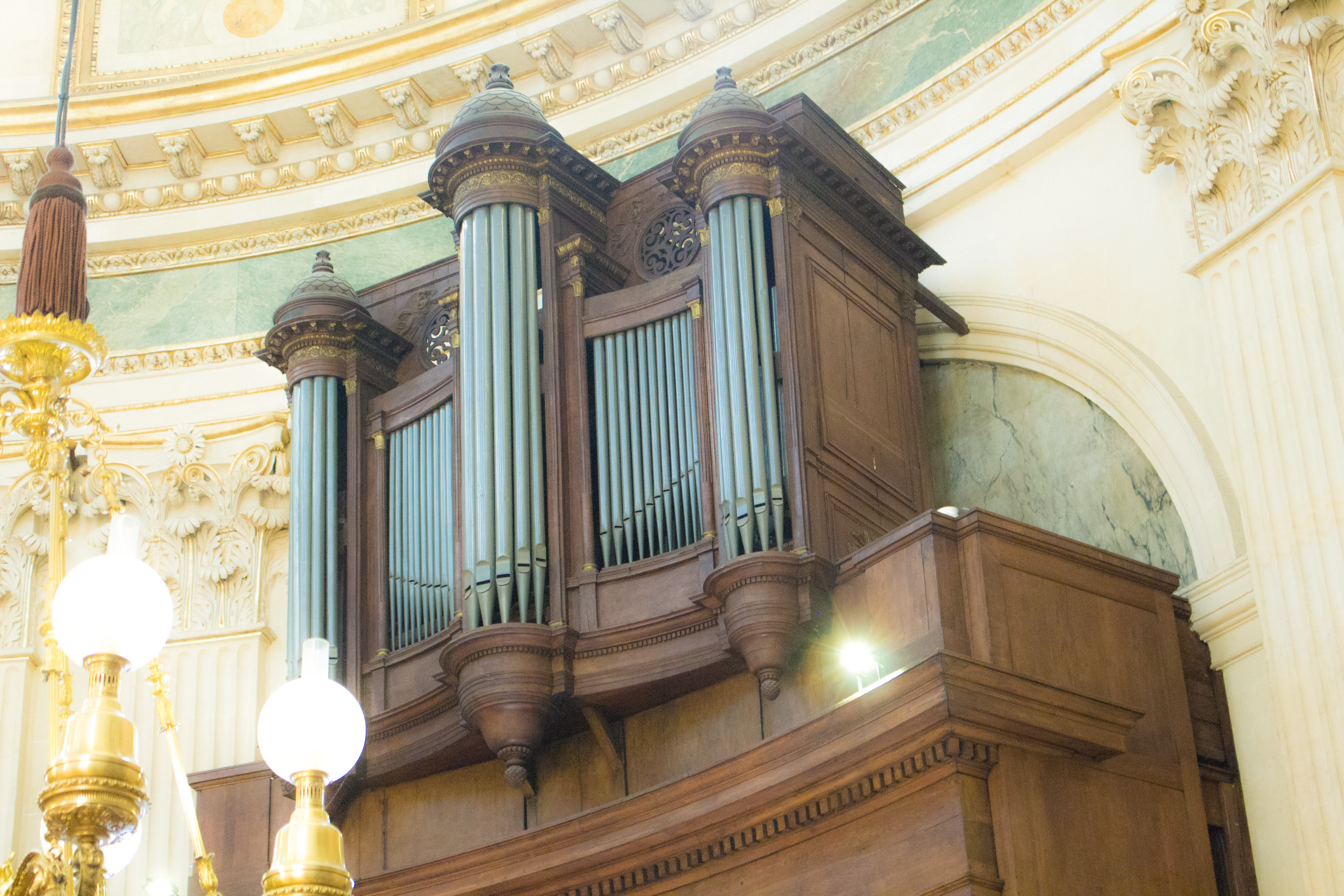 Buffet de l'orgue de l'église polonaise Notre-Dame de l'Assomption, à Paris 1er. Orgue construit par Aristide Cavaillé-Coll à la fin du XIXème siècle.